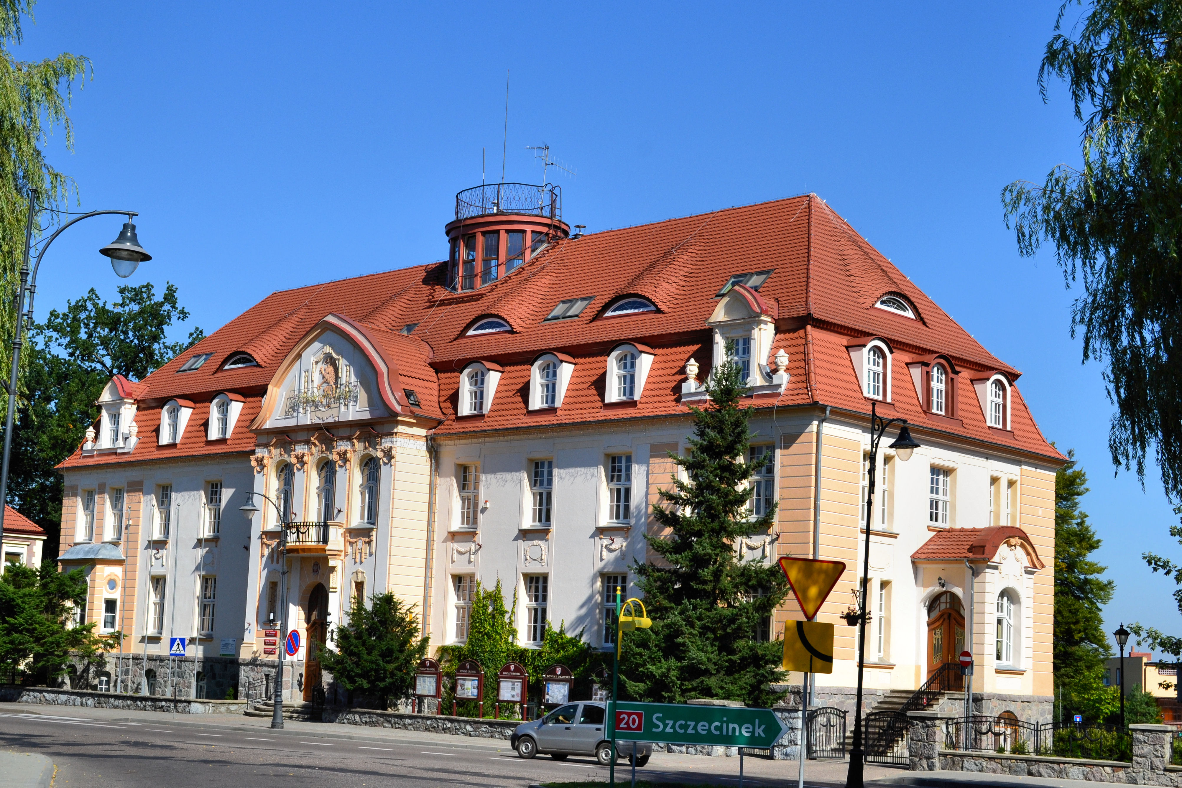 Siedziba władz powiatu drawskiego w Drawsku Pomorskim